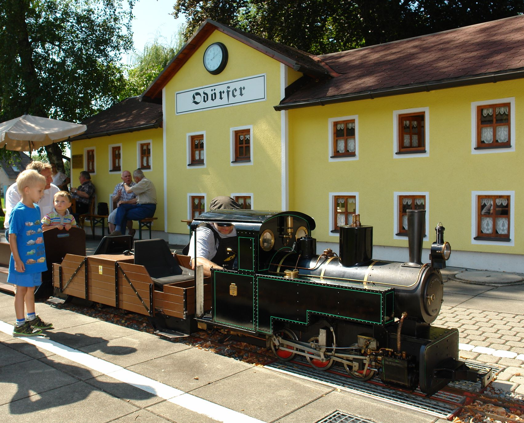 Dampfbahnclub Graz